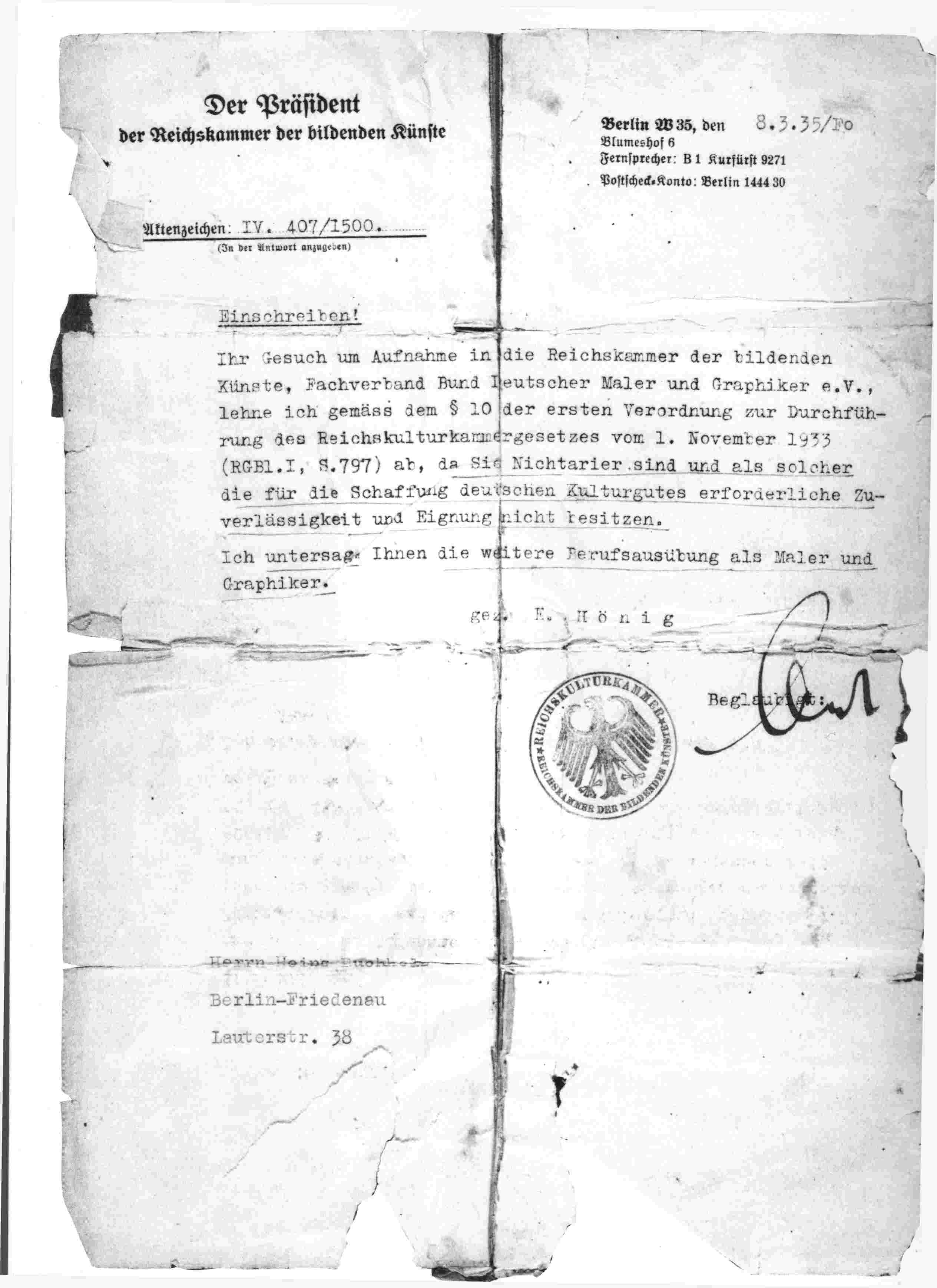 Schreiben des Präsidenten der Reichskunstkammer, in dem dem Maler Heinz Buchholz verboten wird, seinen Beruf auszuüben.